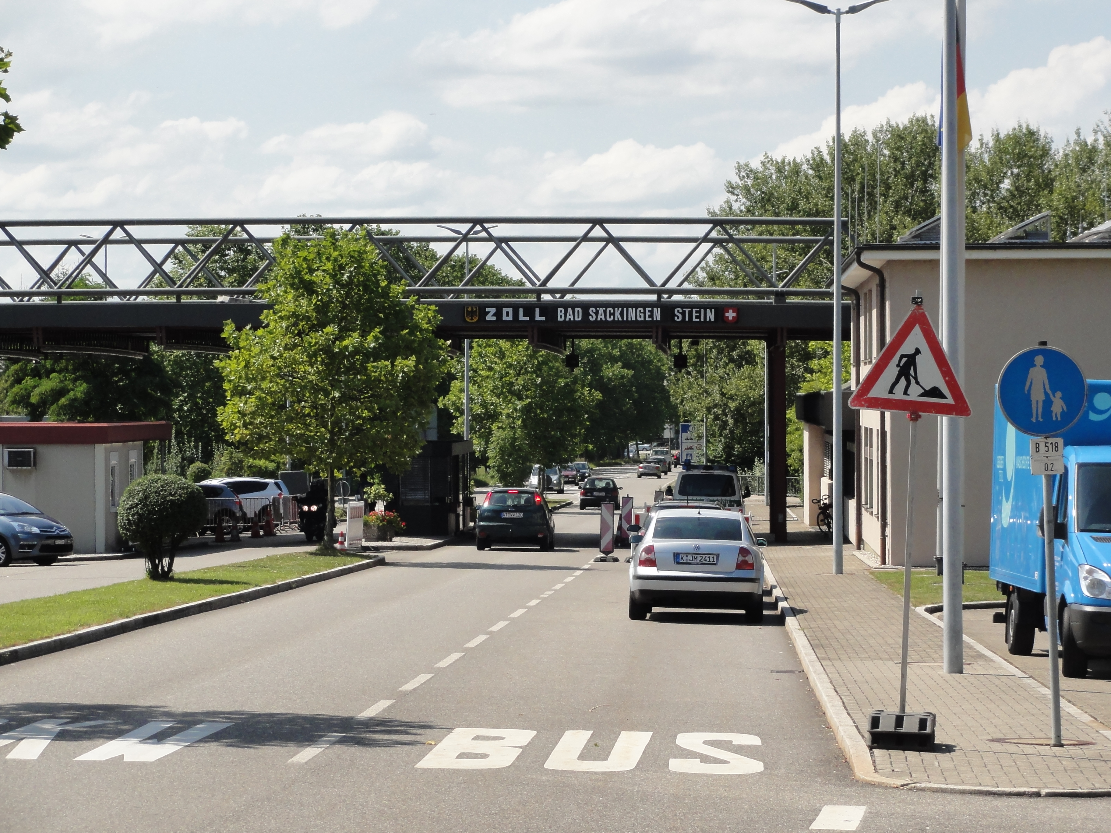 Fridolinsbrücke von Stein AG kommend: Grenzabfertigungsgebäude von Schweizer Seite Info GPS data may be inaccurate. EXIF data regarding date and time may be inaccurate.